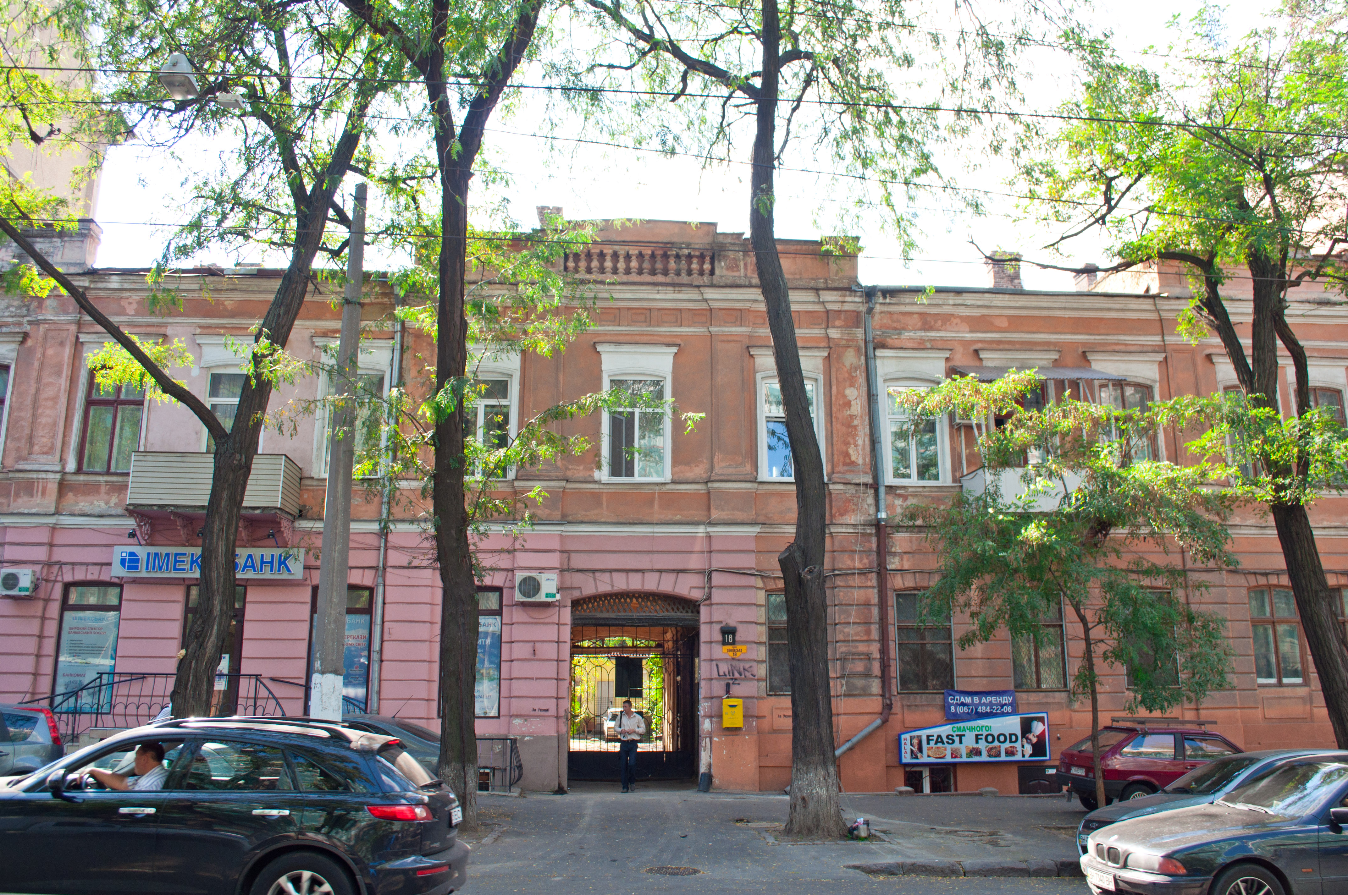 Будинок, у якому жили і працювали М.А. Врубель та В.Л. Сєров - художники